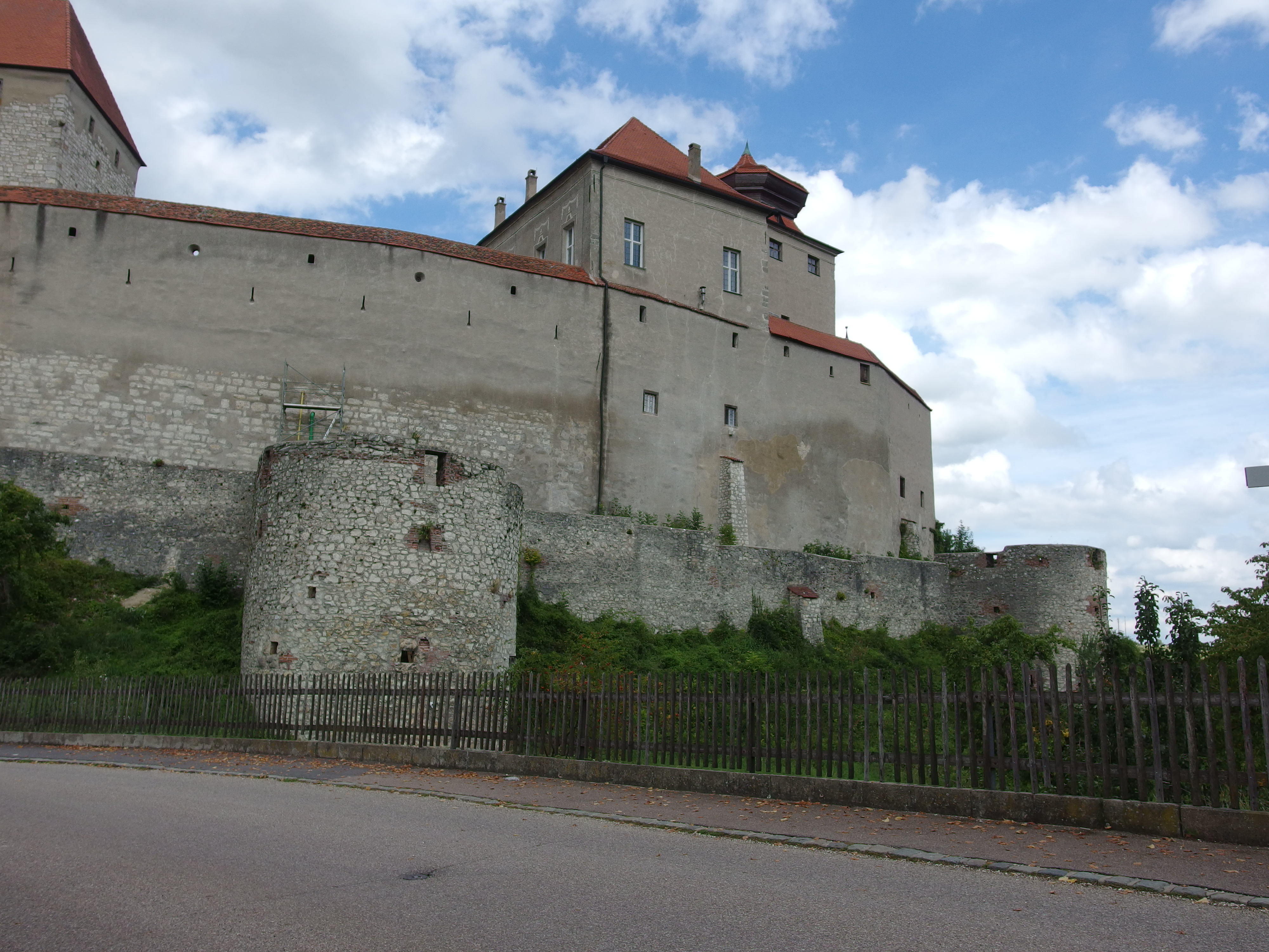 Harburg, Schloß Harburg, Ansicht von SSO gegen SaalbauThis is a photograph of an architectural monument.